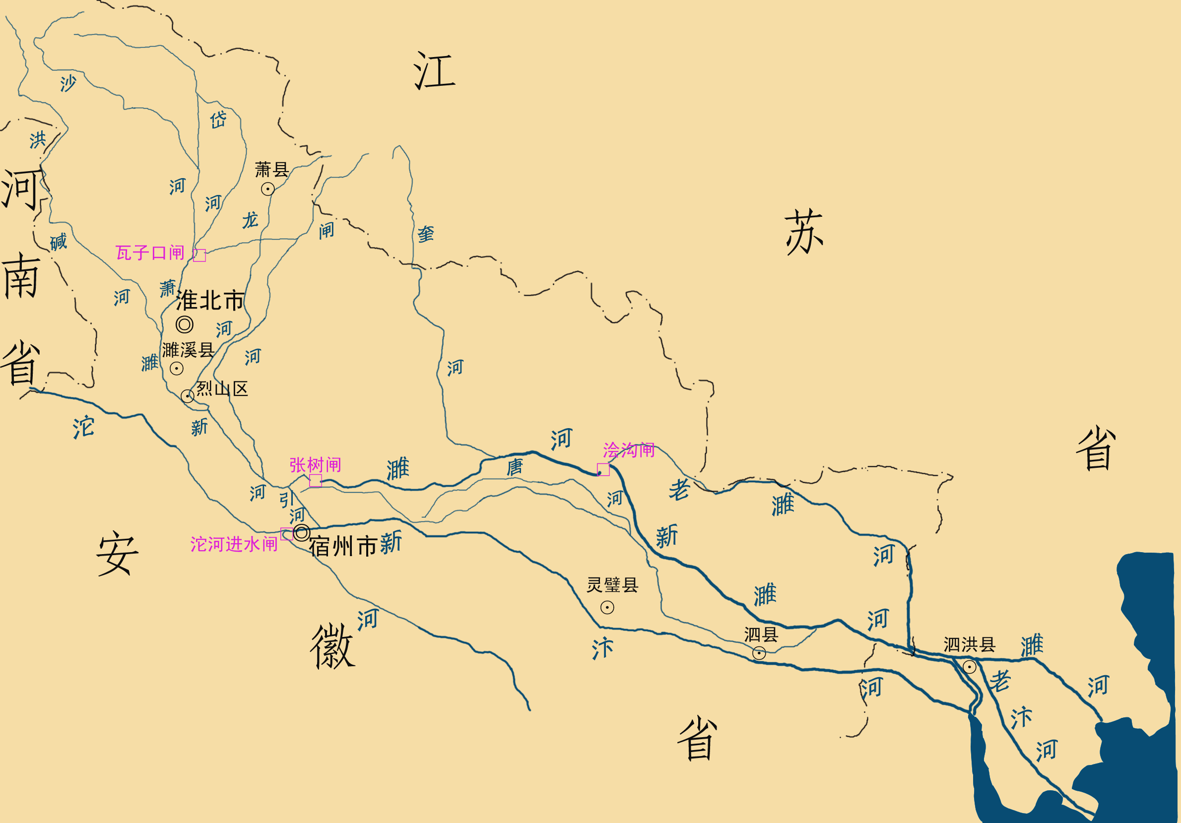 濉河干流及其主要支流示意图，数据依据《中国河湖大典 淮河卷》